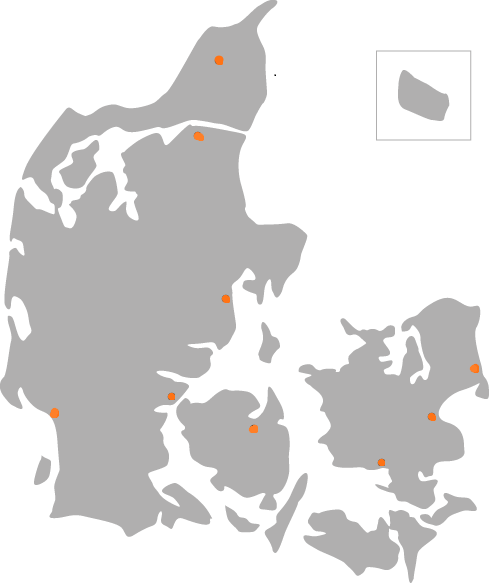 Kort over Byggesocietetets ni lokalområder